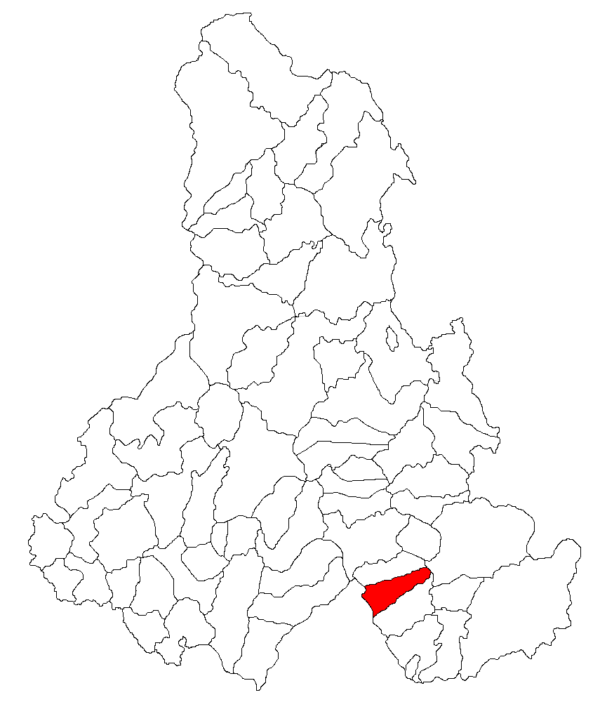 Categorie:Hărţi ale judeţului Harghita Contents 1 Licensing 2 Sursă 3 Licensing 4 Original upload log Licensing Sursă ro::Imagine:Harta_jud_Harghita.png